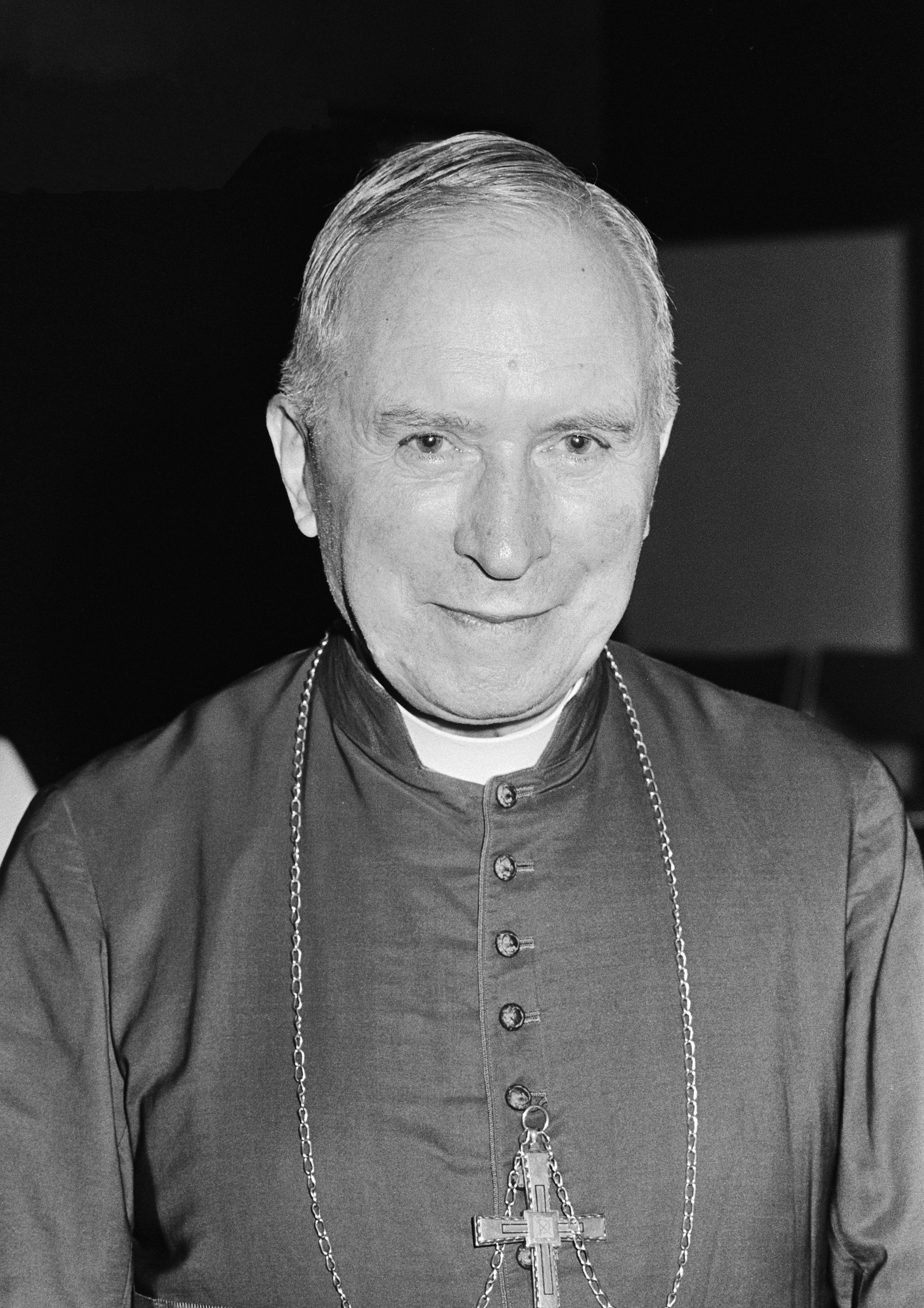 In Veldhoven heeft de uit zijn ambt ontheven Franse aartsbisschop Lefebure een mis opgedragen volgens de oude ritus; mgr. Lefebure (kop)